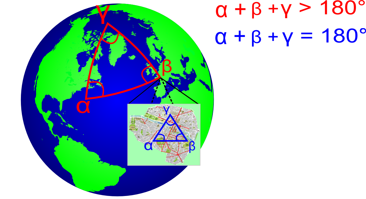 Schema de triangles sur un globe